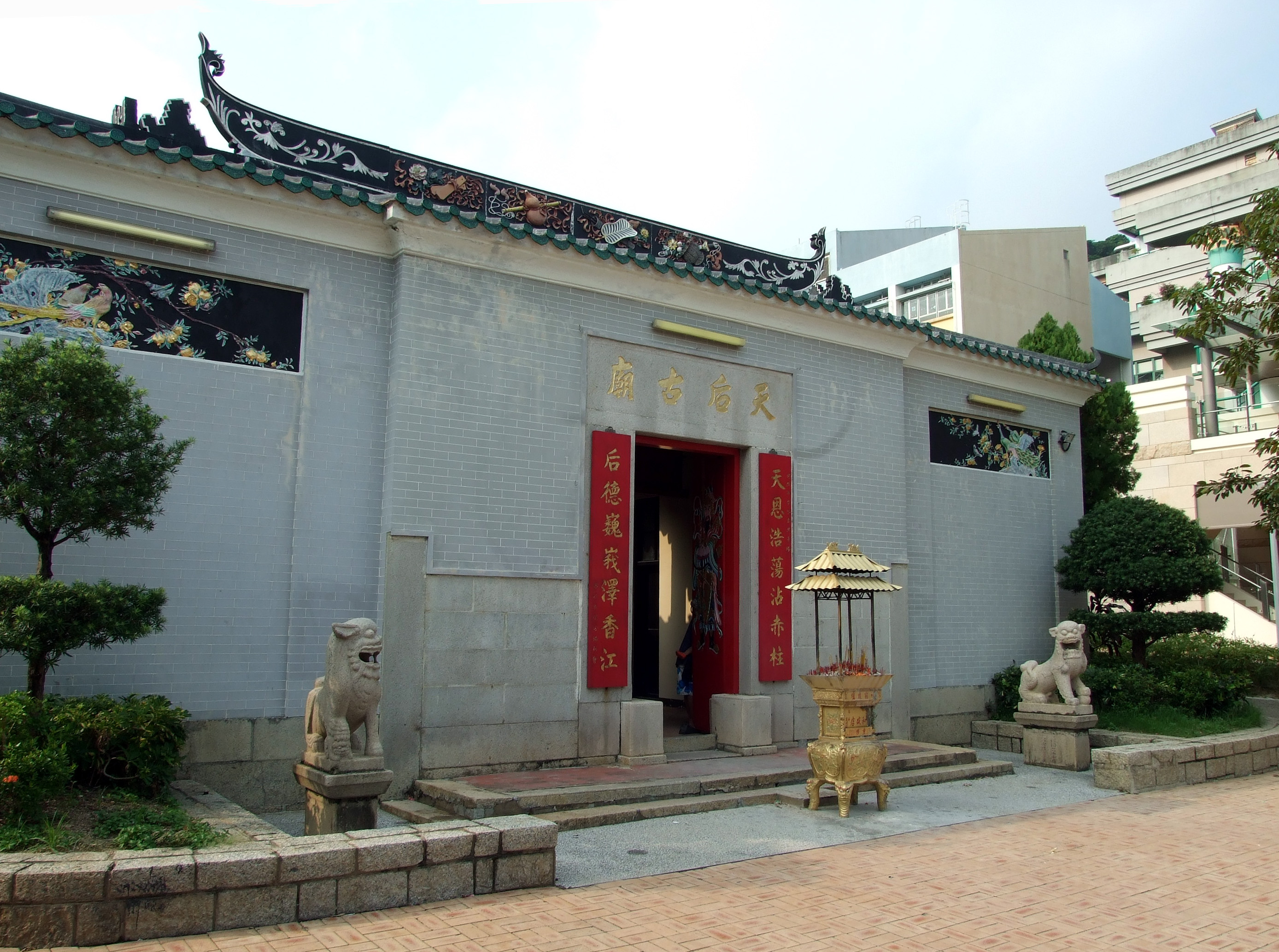 中文（香港）: 赤柱天后古廟